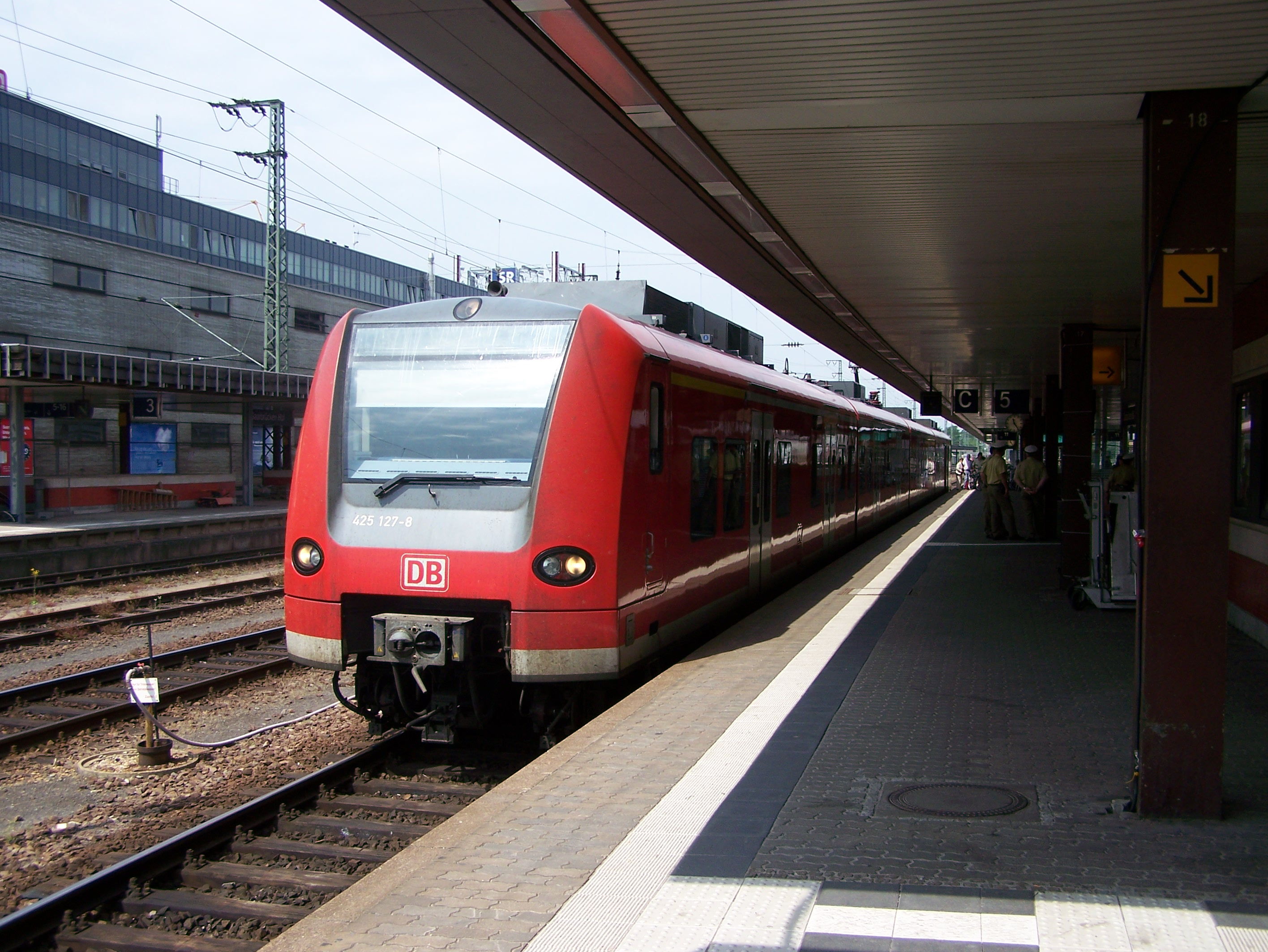 Zug der Baureihe 425 auf Gleis 5 im Saarbrücker Hauptbahnhof (RB nach Homburg)